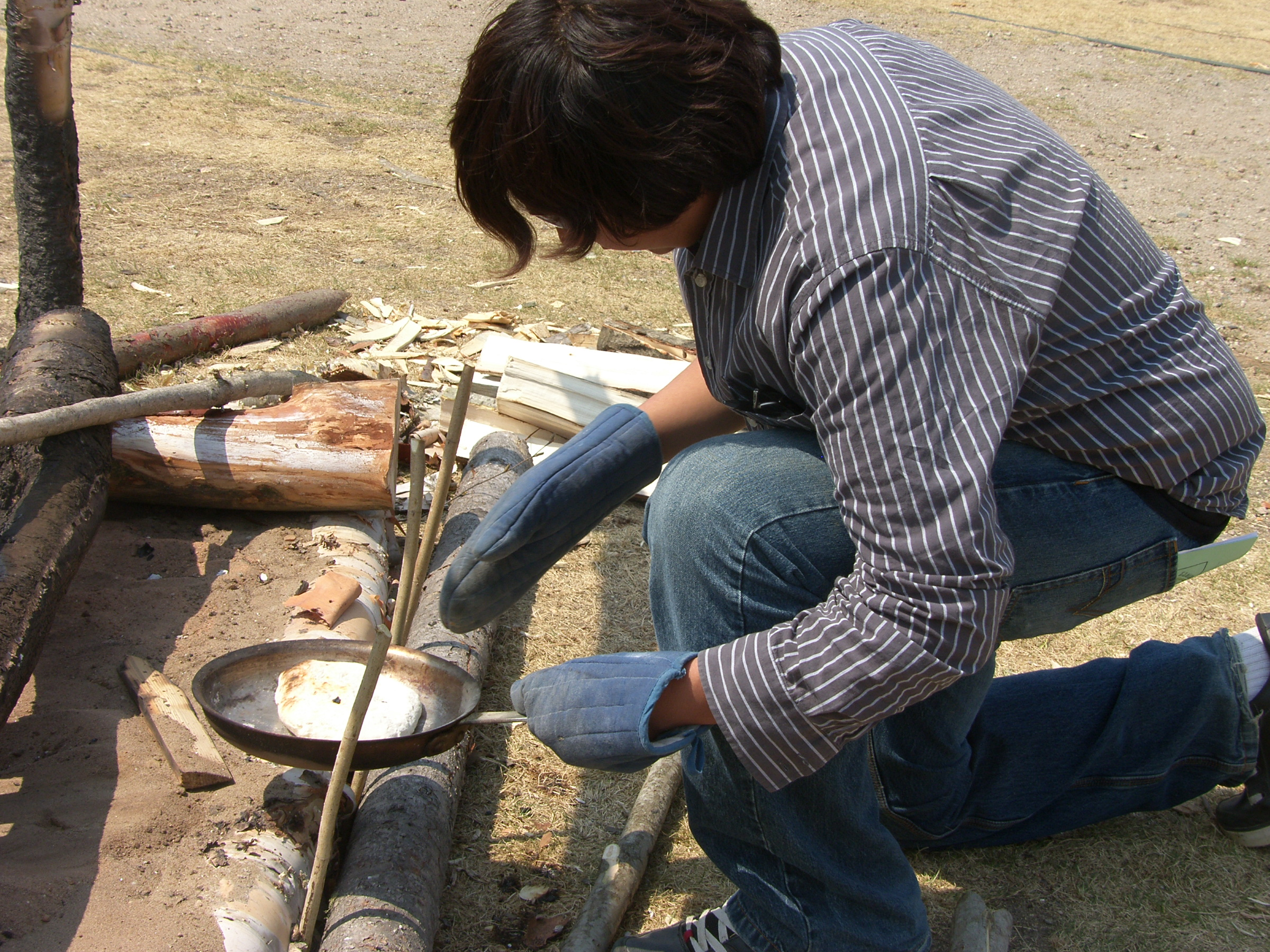 Cuisson de la bannique sur le feu à ciel ouvert